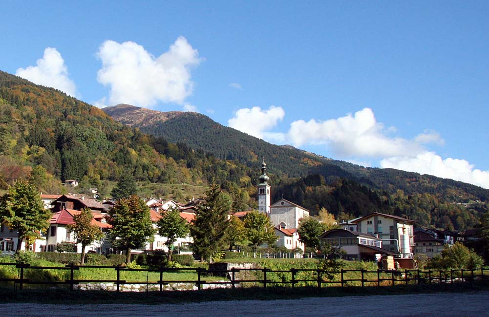 Foto non protetta da copyright rappresentante il paese di Treppo Canico (UD)